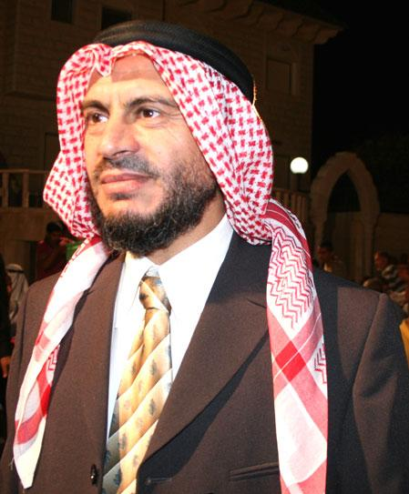 השייח חמאד דעבס